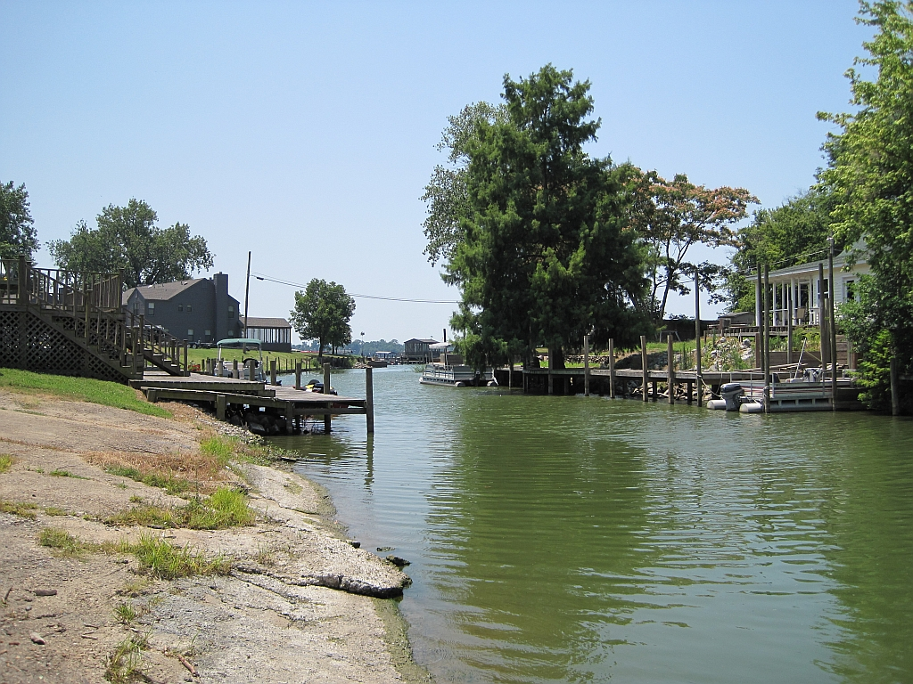 Horseshoe Lake, Arkansas Horseshoe Lake, sidearm